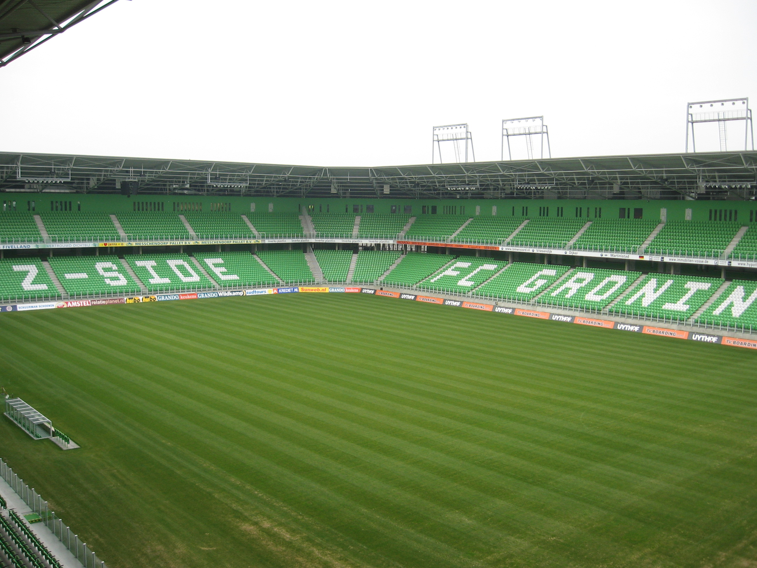 Description De Euroborg, het stadion van FC Groningen. Date18 October 2006SourceOwn workAuthorKevsterPermission (Reusing this file) Vrijgegeven onder GFDL. De Euroborg, het stadion van FC Groningen.